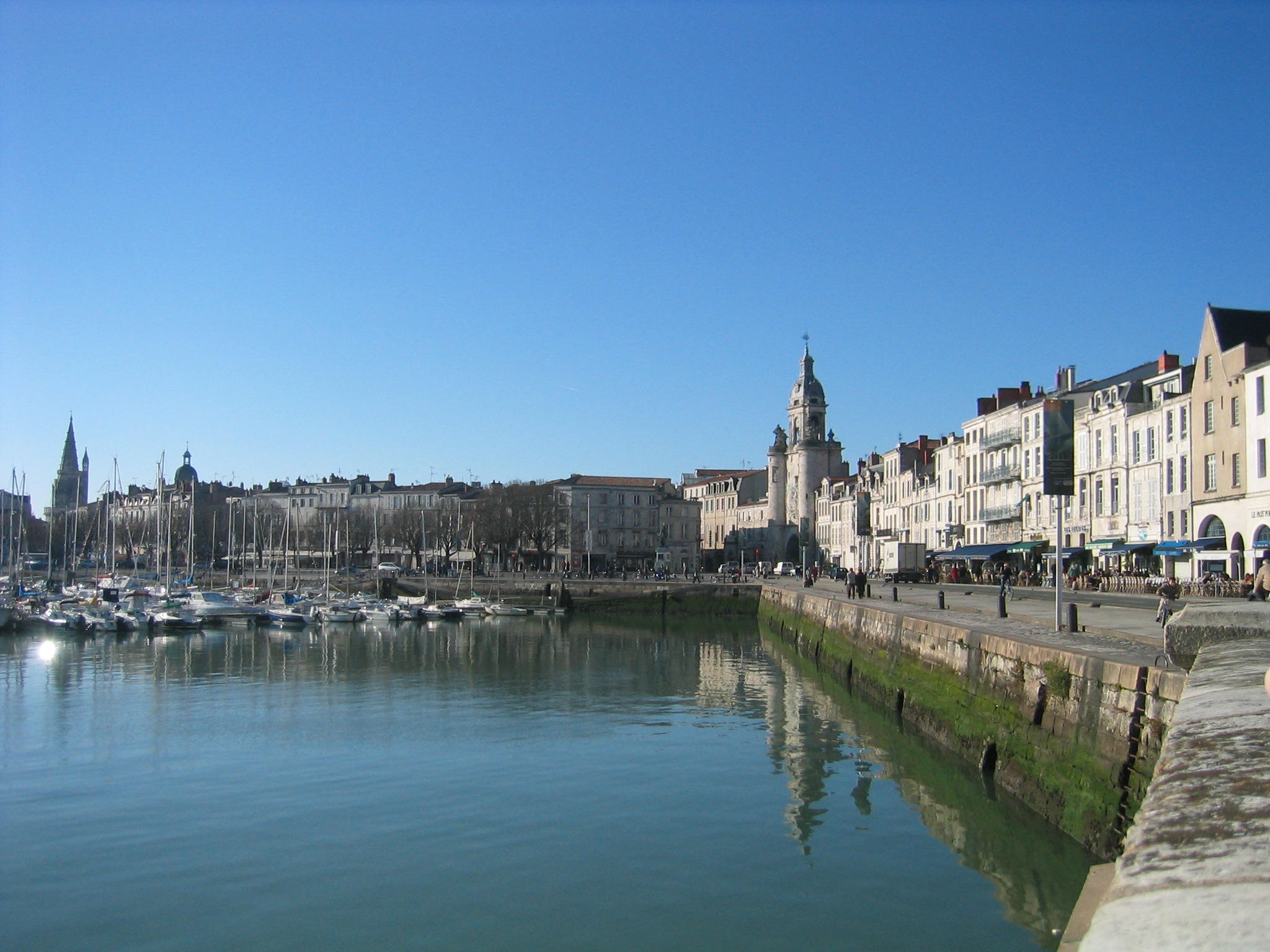 Le vieux port de La Rochelle le 29/12/2004 (très beau temps)